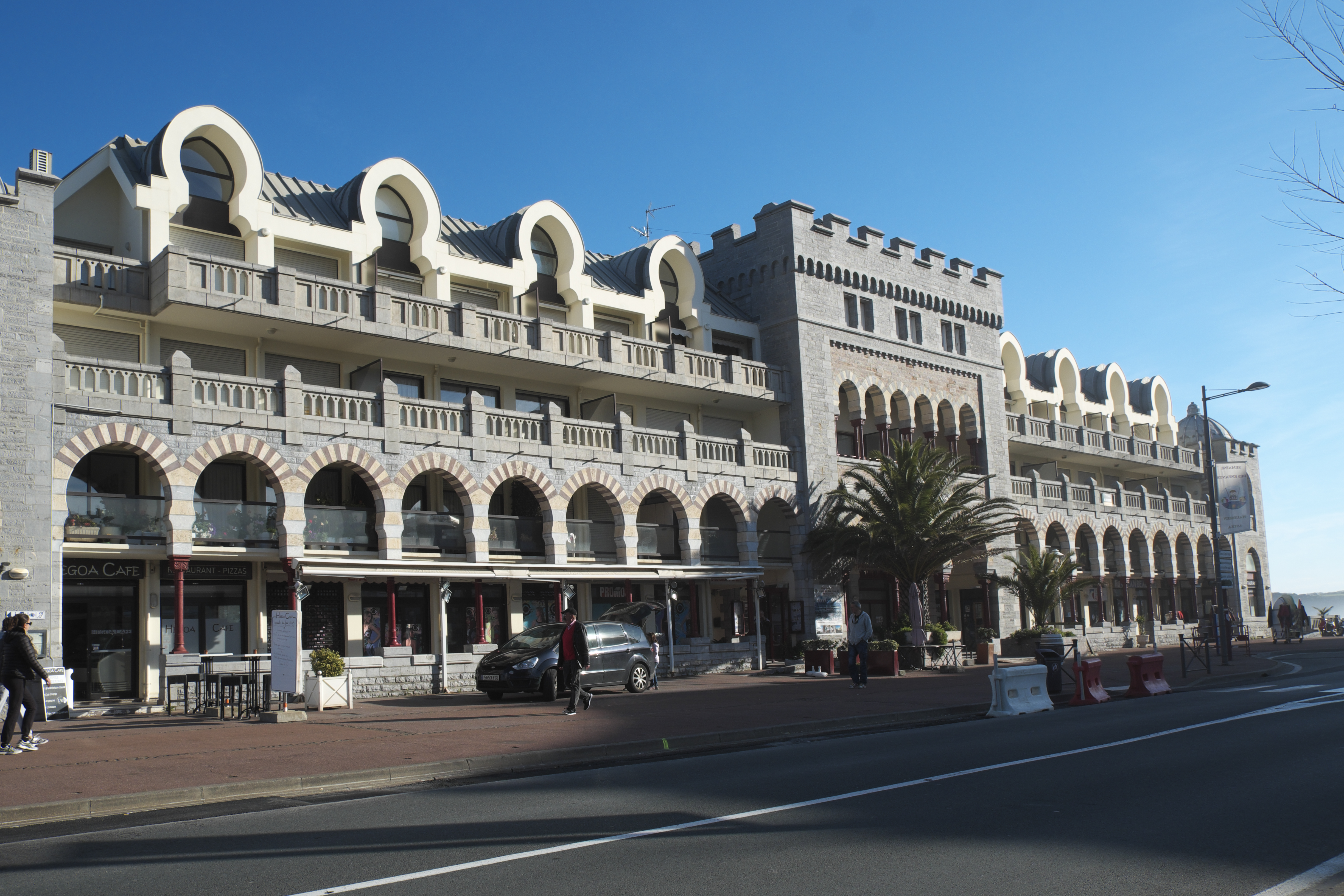 Ehemaliges Casino in Hendaye im Département Pyrénées-Atlantiques (Region Aquitaine-Limousin-Poitou-Charentes/Frankreich)